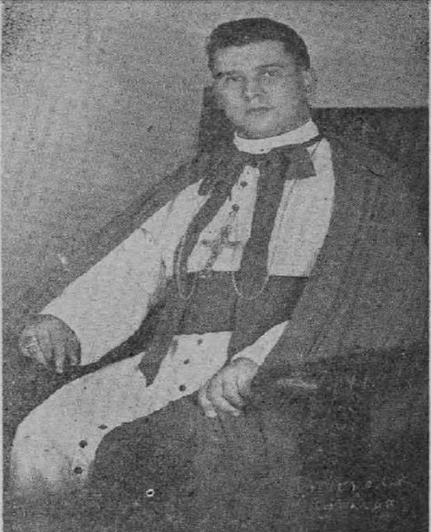 Mons. Luis Fernando Castillo Mendez en 1948